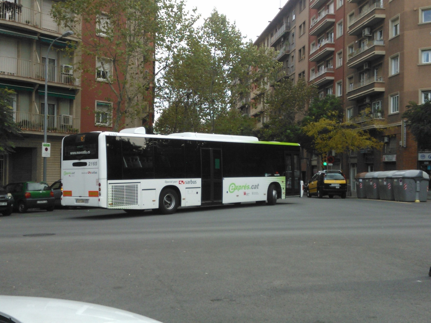 Autobús interurbà/urba a Barcelona